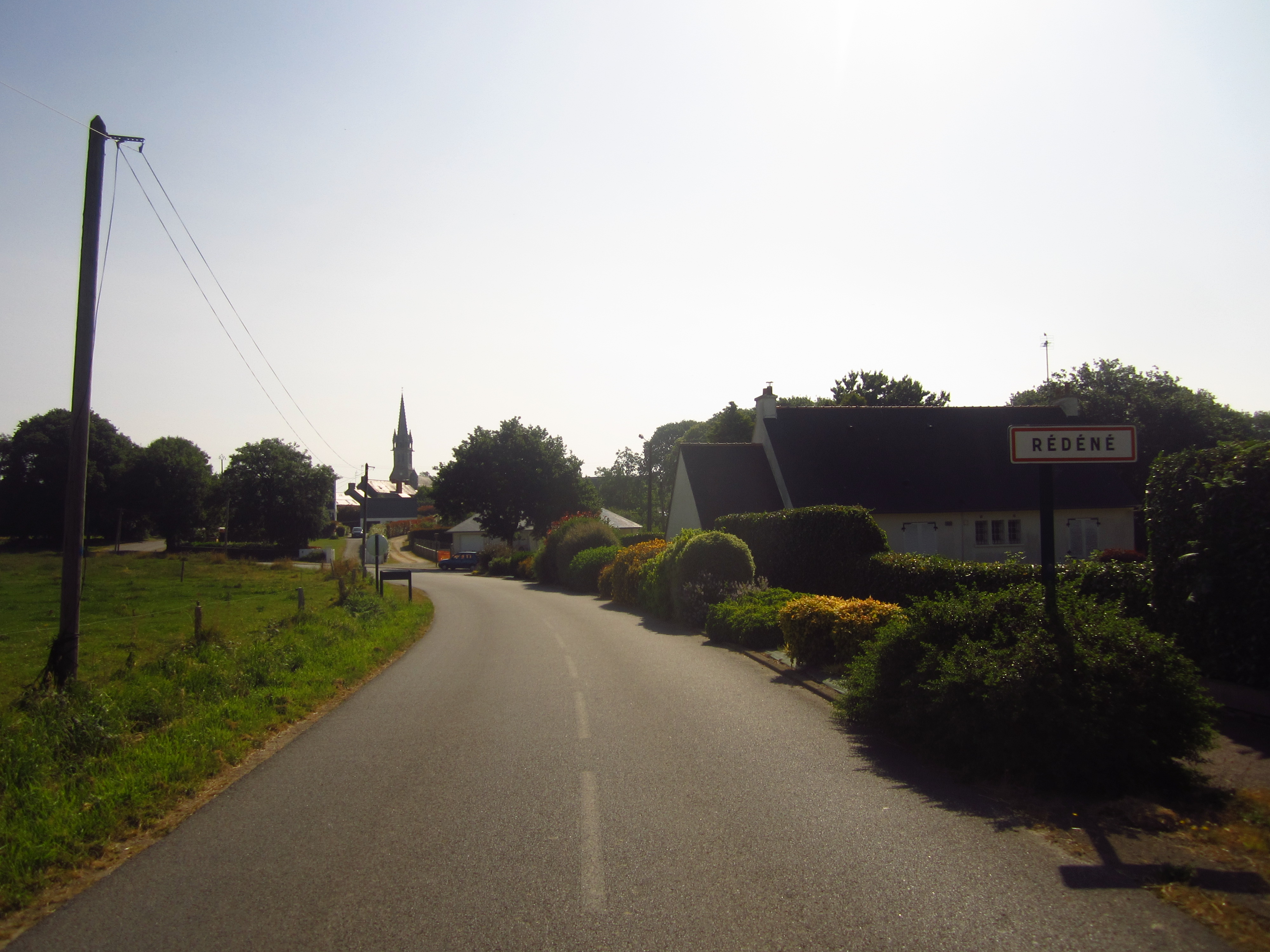 Rédené, Finistère